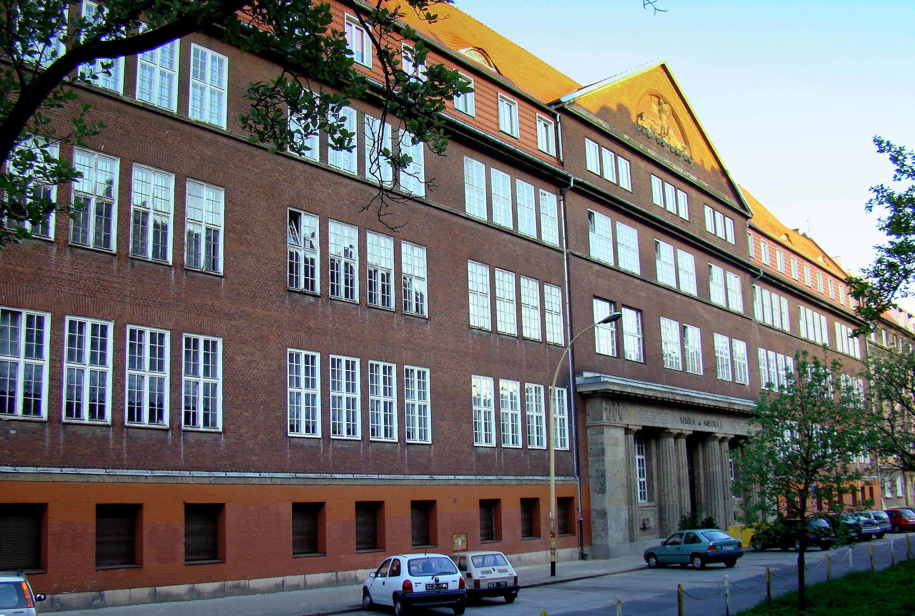 Gimnazjum Mariackie w Szczecinie, Polska